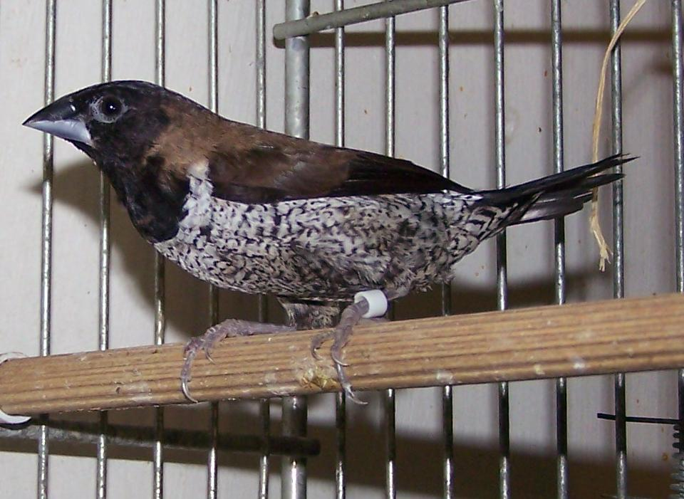 L. molucca